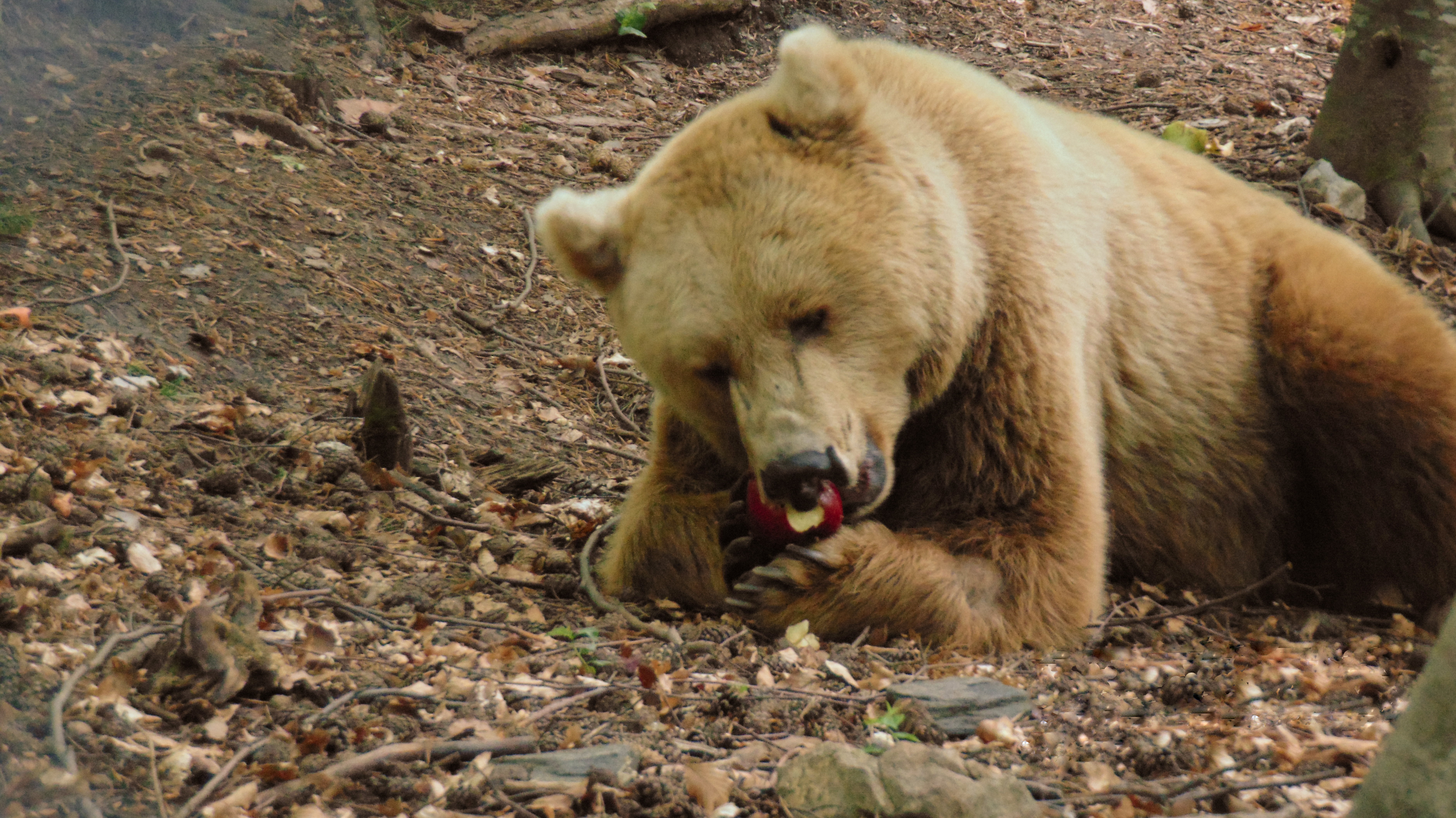 Рила, Рила